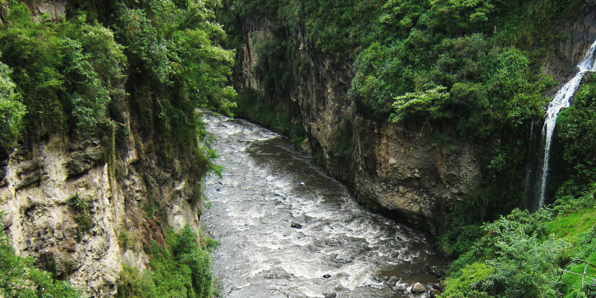 Este es el rio que pasa debajo del es Santuario de las Lajas